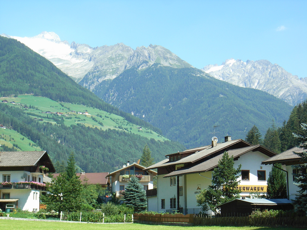 Luttach im Tauferer Ahrntal ist umgeben von Dreitausendern. In dieser wunderbaren Landschaft lässt es sich hevorragend entspannen, wandern und genießen. powered by